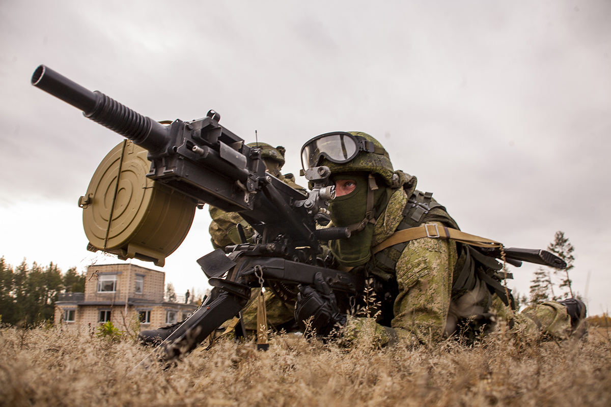 АГС-17 на тактико-специальных занятиях снайперов спецназа ЗВО.